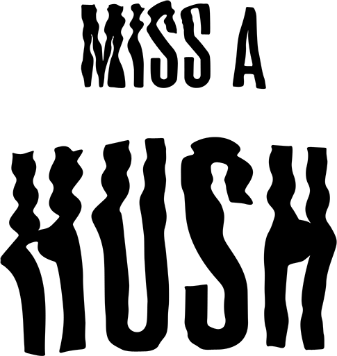 Logo de Hush de Miss A